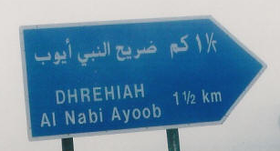 Иов в Омане